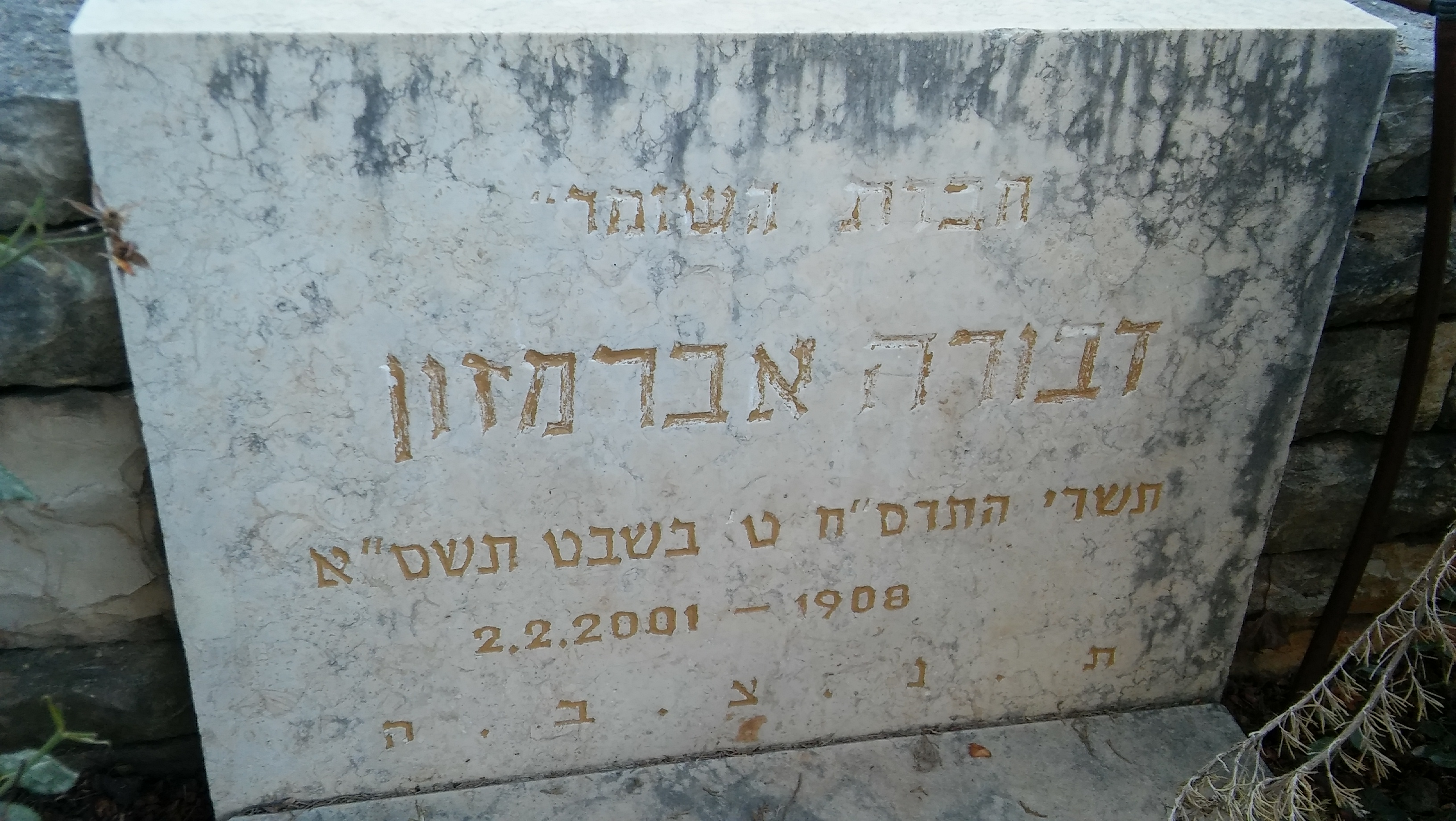 הקבר של דבורה אברמסון (למיסוב) בחלקת השומר בבית הקברות בכפר גלעדי